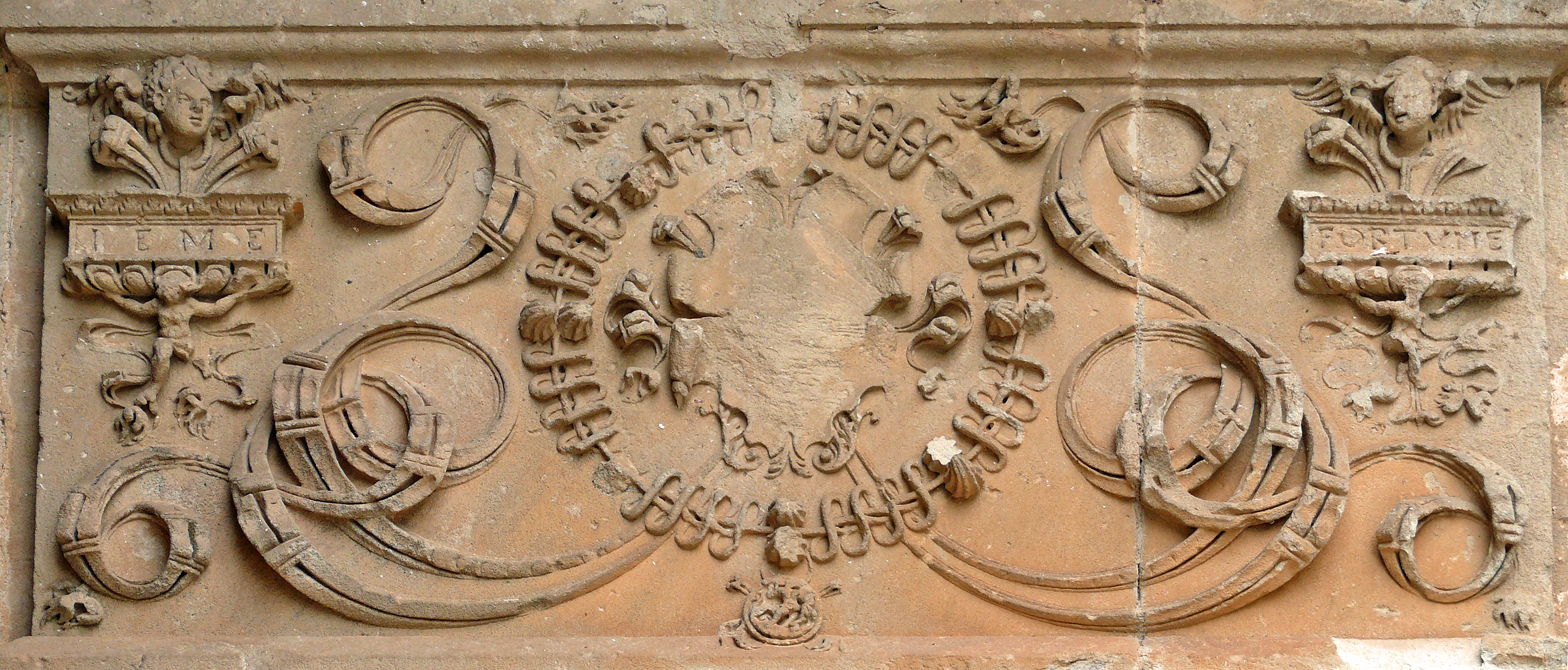 Assier - Frise sculptée de l'église Saint-Pierre - Panneau de la frise sur le ressaut de la porte de la chapelle seigneuriale